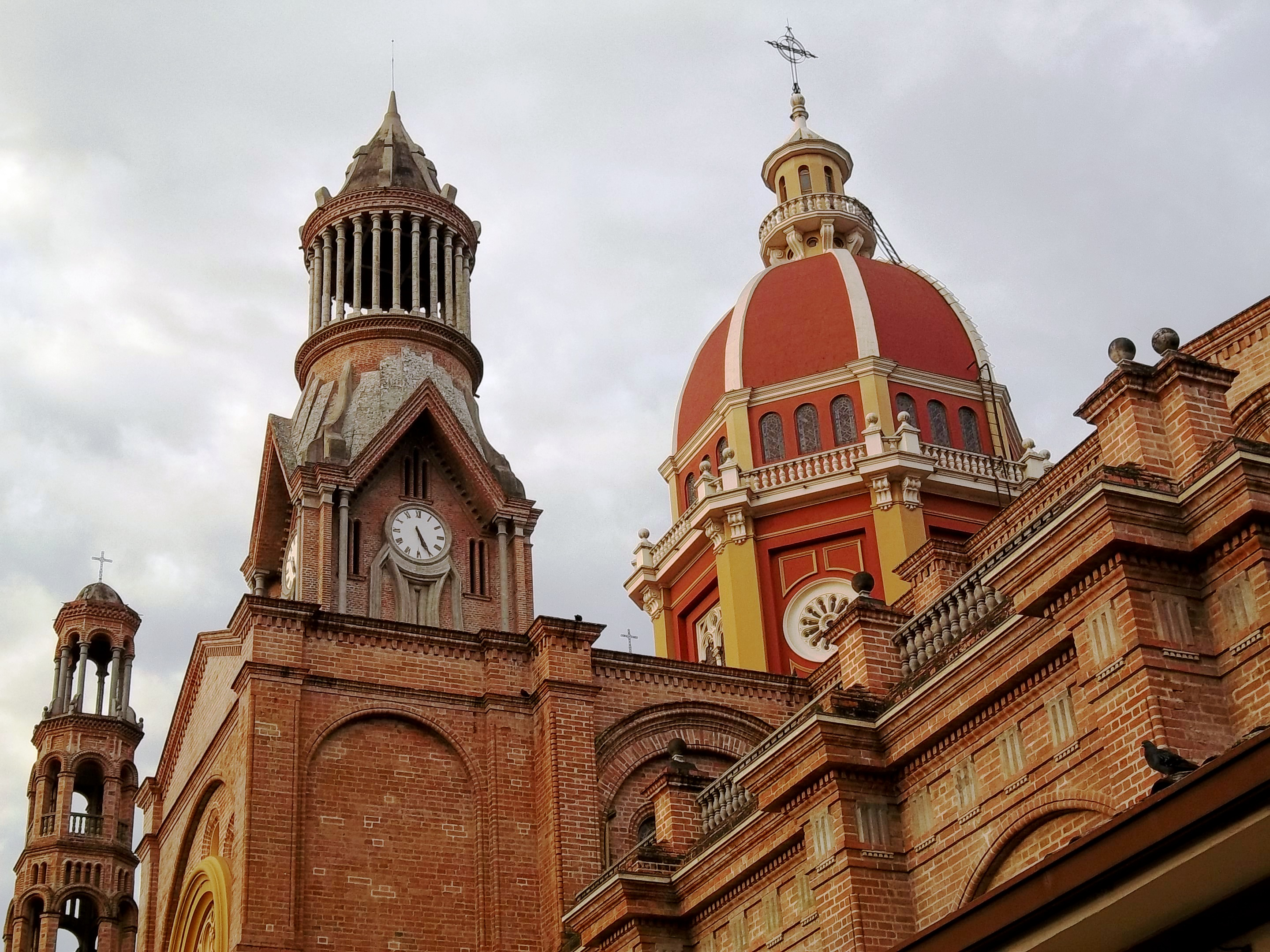 Catedral de Nuestra Señora del Rosario del Palmar